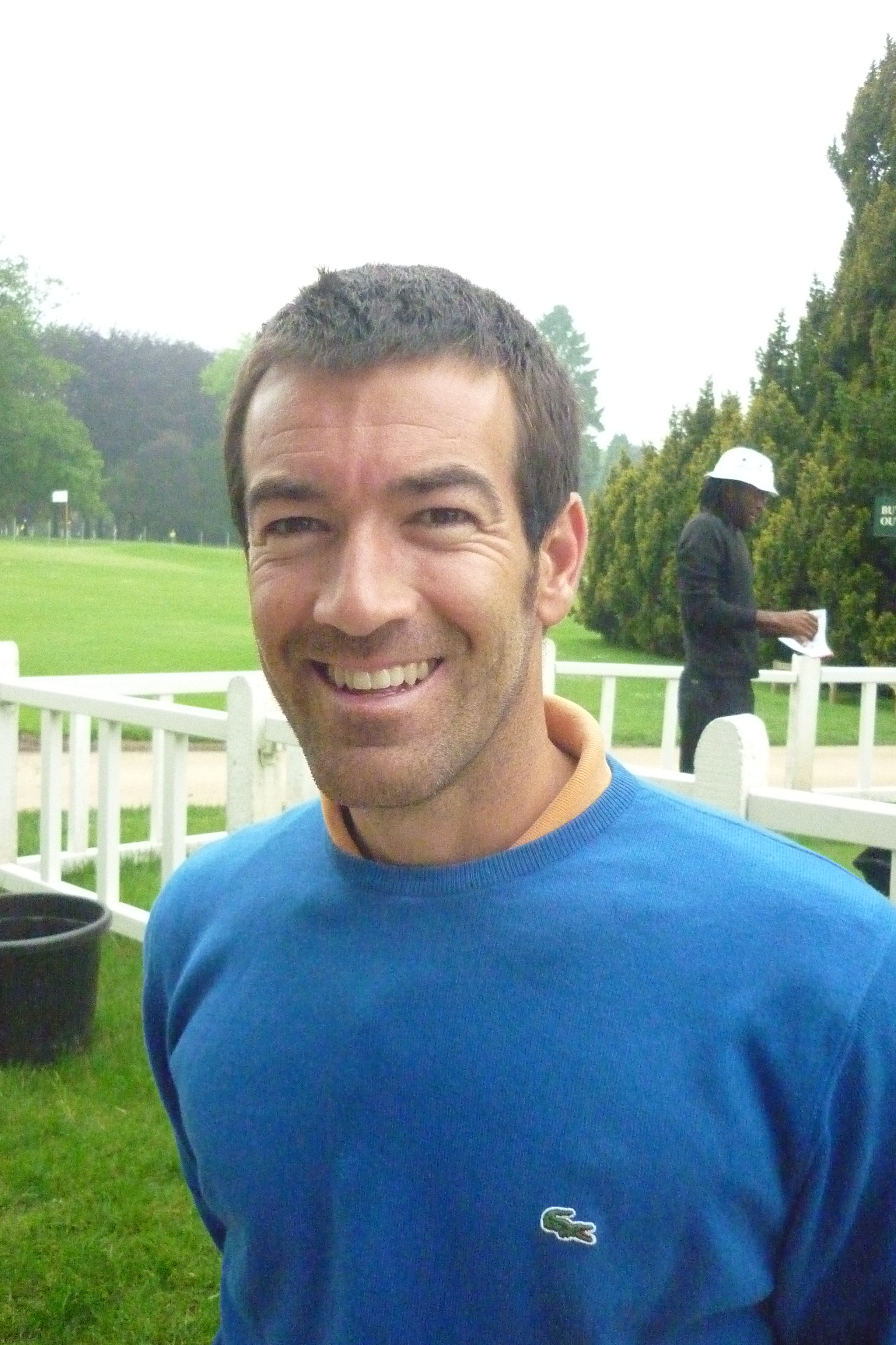 Eduardo De la Riva op de Telenet Trophy 2012